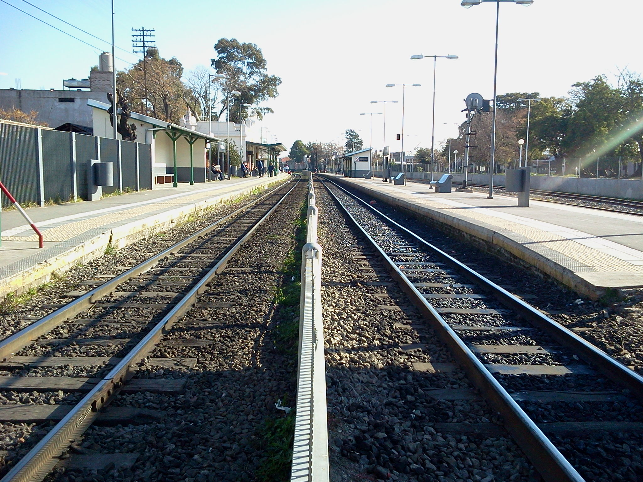 Anden Lateral y Central